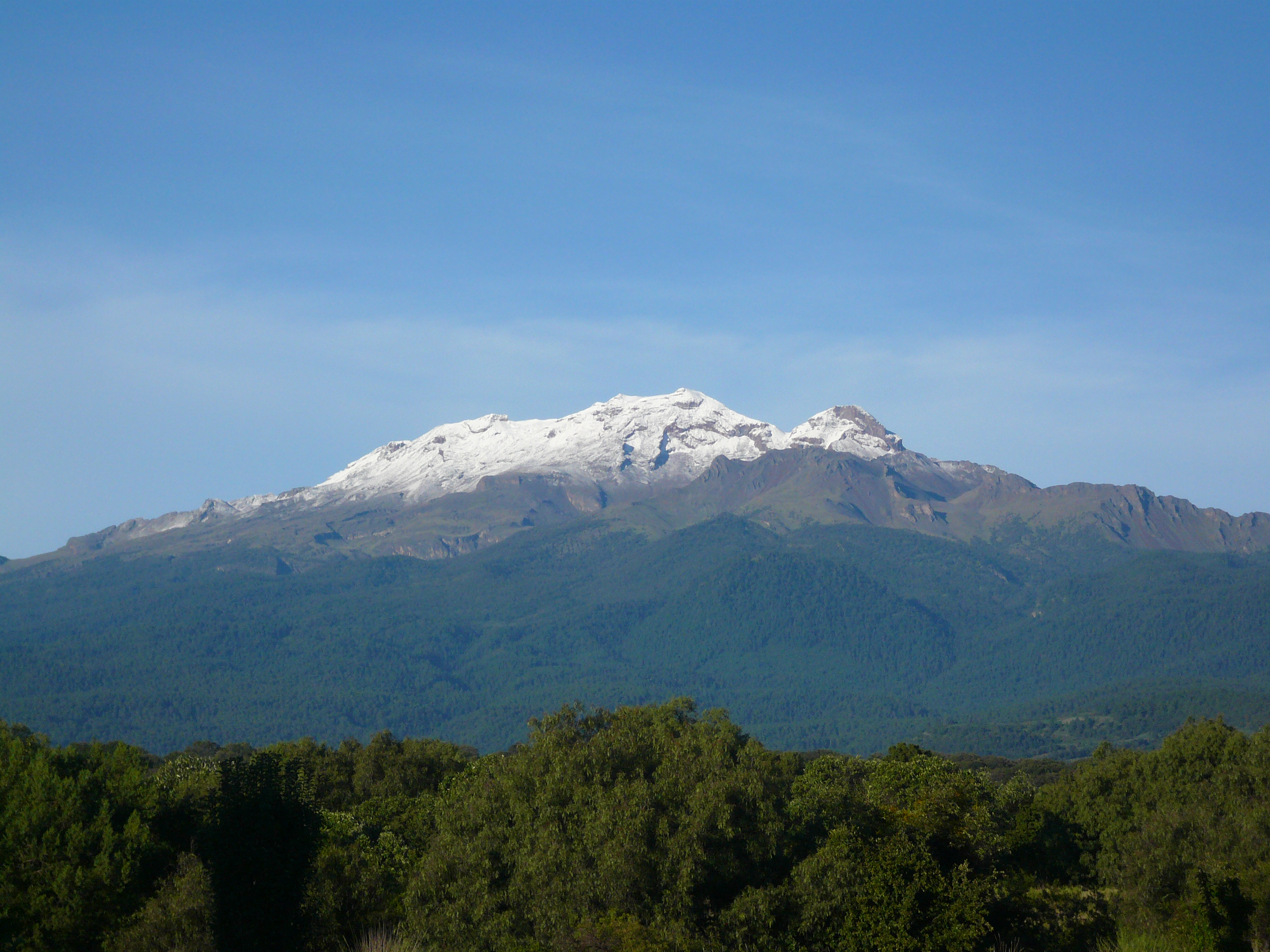 Iztaccíhuatl en el 2010, vista desde la carretera México Puebla